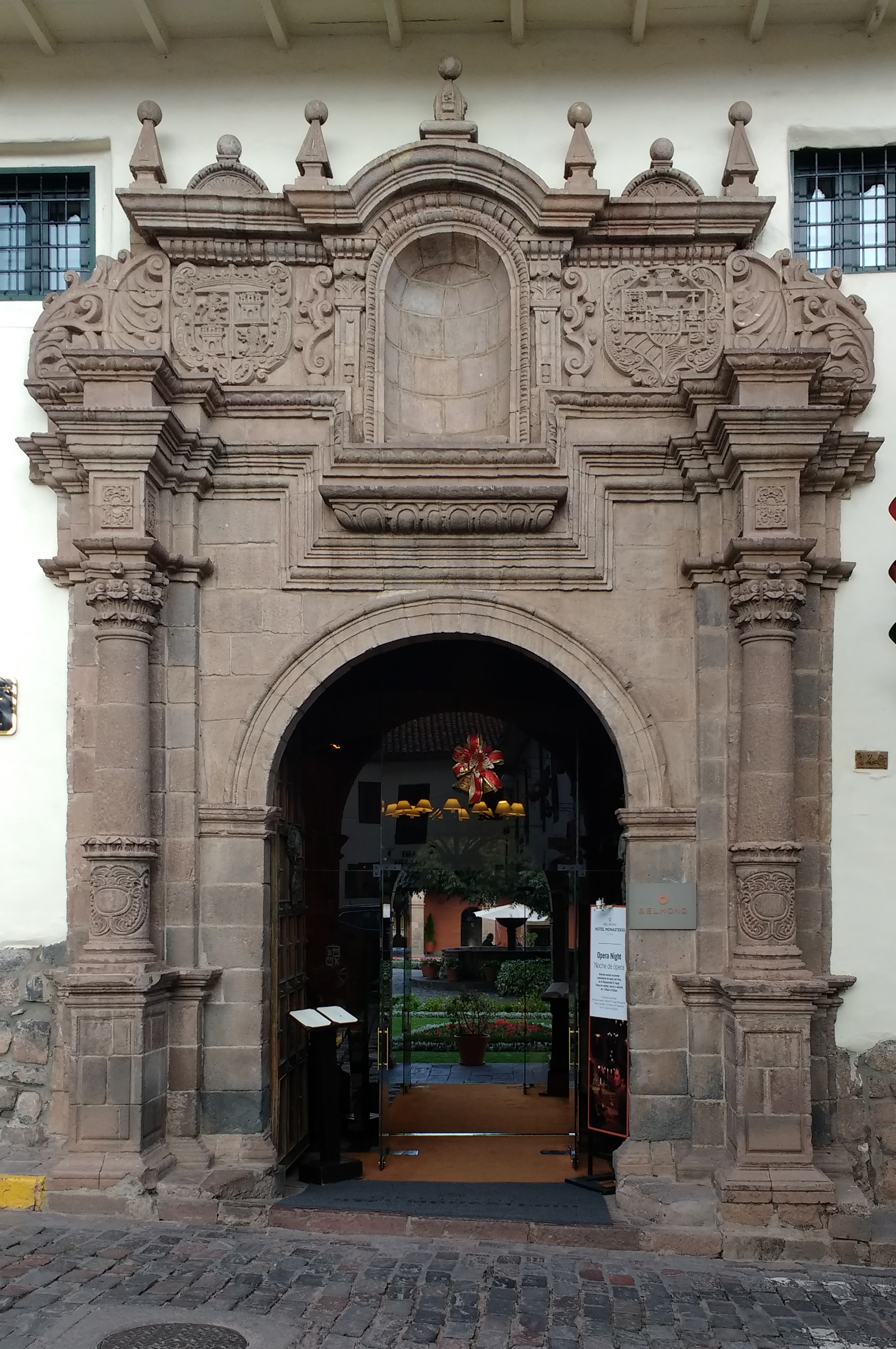 Belmond Hotel Monasterio - Cusco, Peru.